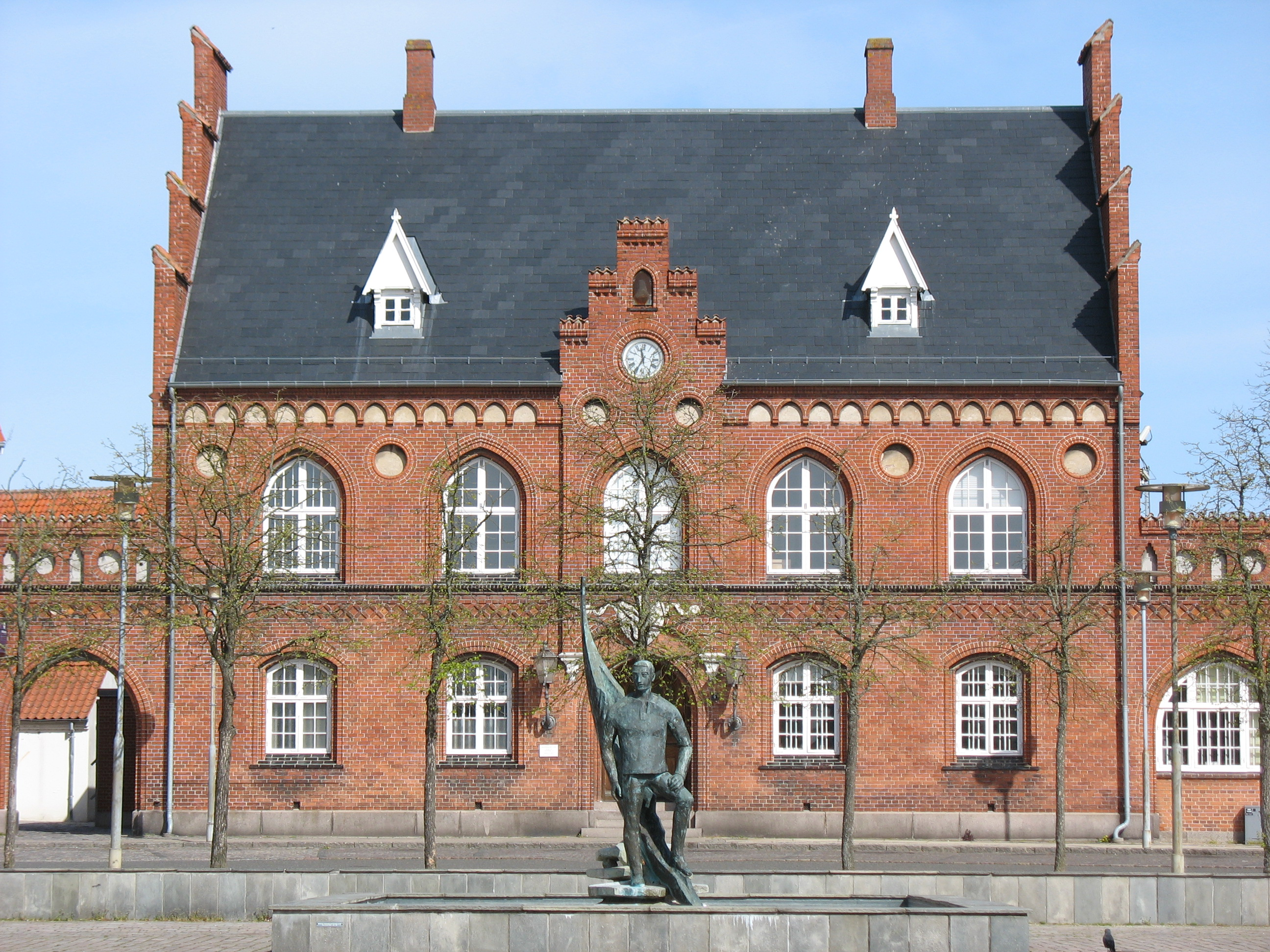 Frederikssund arrest, ved siden af rådhuset - på Torvet